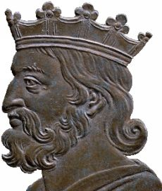 Protrait des fränkischen Königs Dagobert I. Aus französischer Wikipedia zur Lizenz: Auteur Dassier, Jean (1676-1763 ; médailleur) Titre Médaille Publication [Paris], [ca 1720] Description : bronze ; 31 mm ; 14,06 g Licence: GPL et GNU FDL Notes Acq. 95-0640 Cote : BNF Richelieu Monnaies, médailles etantiques exemplaire unique L'ensemble est conservé dans deux boîtes cylindriques en buis. Tranche cannelée Identifiant 07700011 Détail du contenu : No d'image 1 Titre Dagobert I. roy de France. Notes 1720 Sujet(s) Dagobert (vers 600-639 ; roi d'Austrasie, puis des Francs :Ier:+01+ Image trouvé sur le site internet Gallica de la Bibliothèque nationale de France